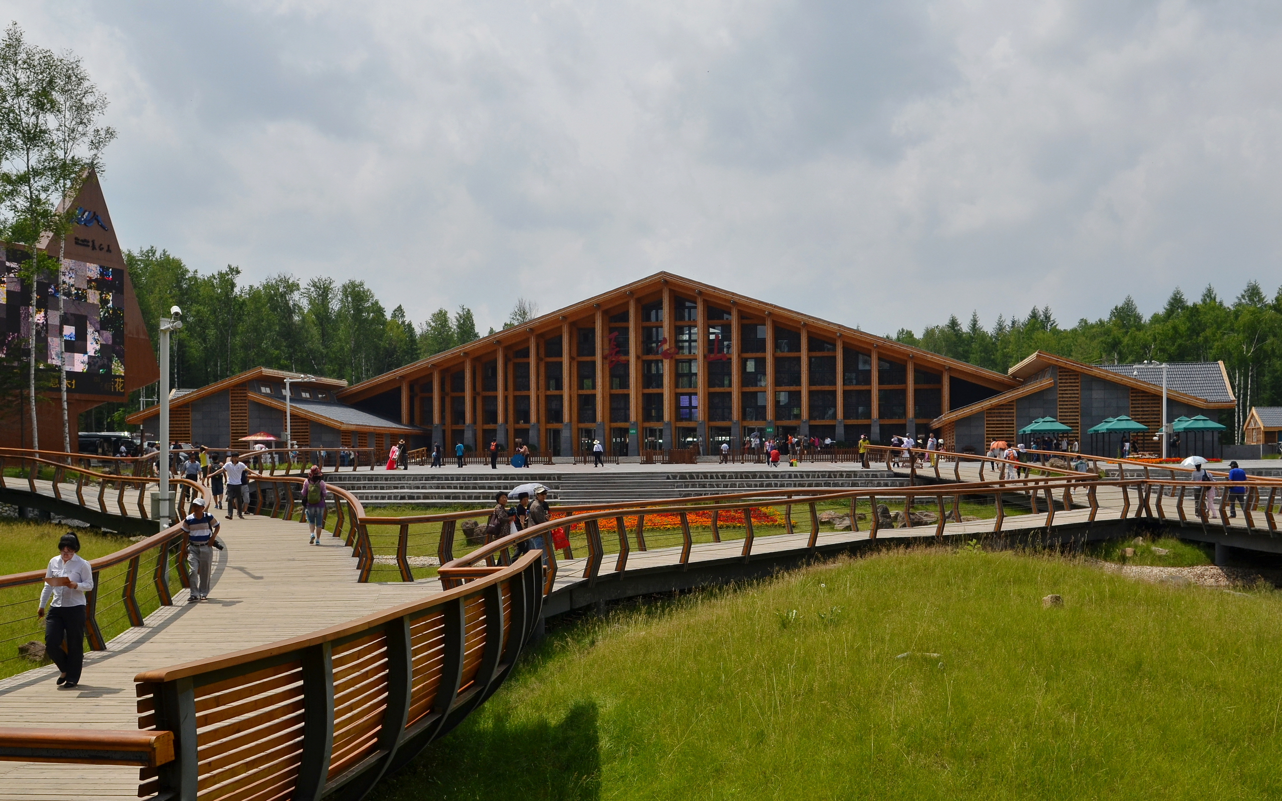 长白山池北区的北坡山门